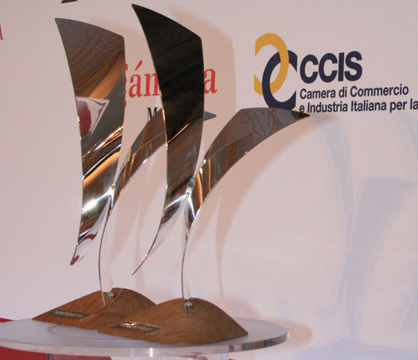 Premio Tiepolo